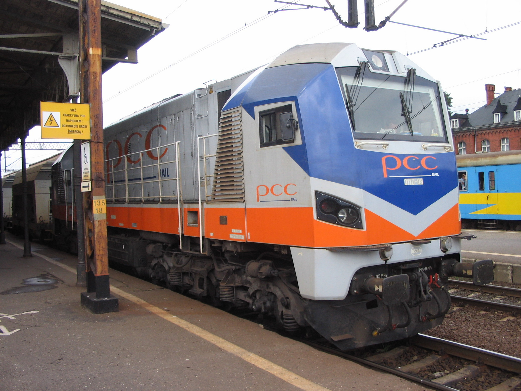 311D-08 przewoźnika PCC Rail na stacji Toruń Główny